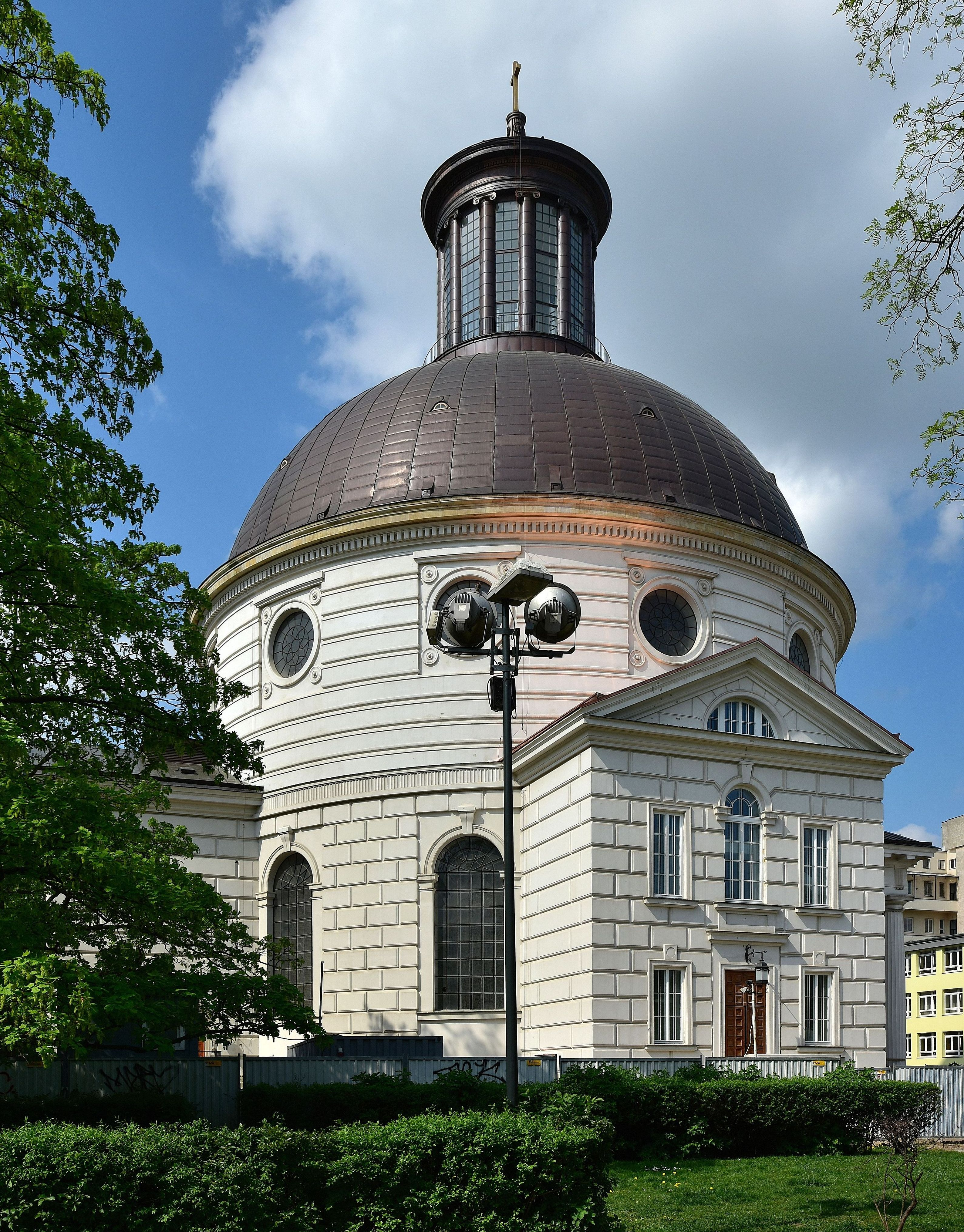 Ewangelicko-augsburski kościół Świętej Trójcy na placu Małachowskiego w Warszawie